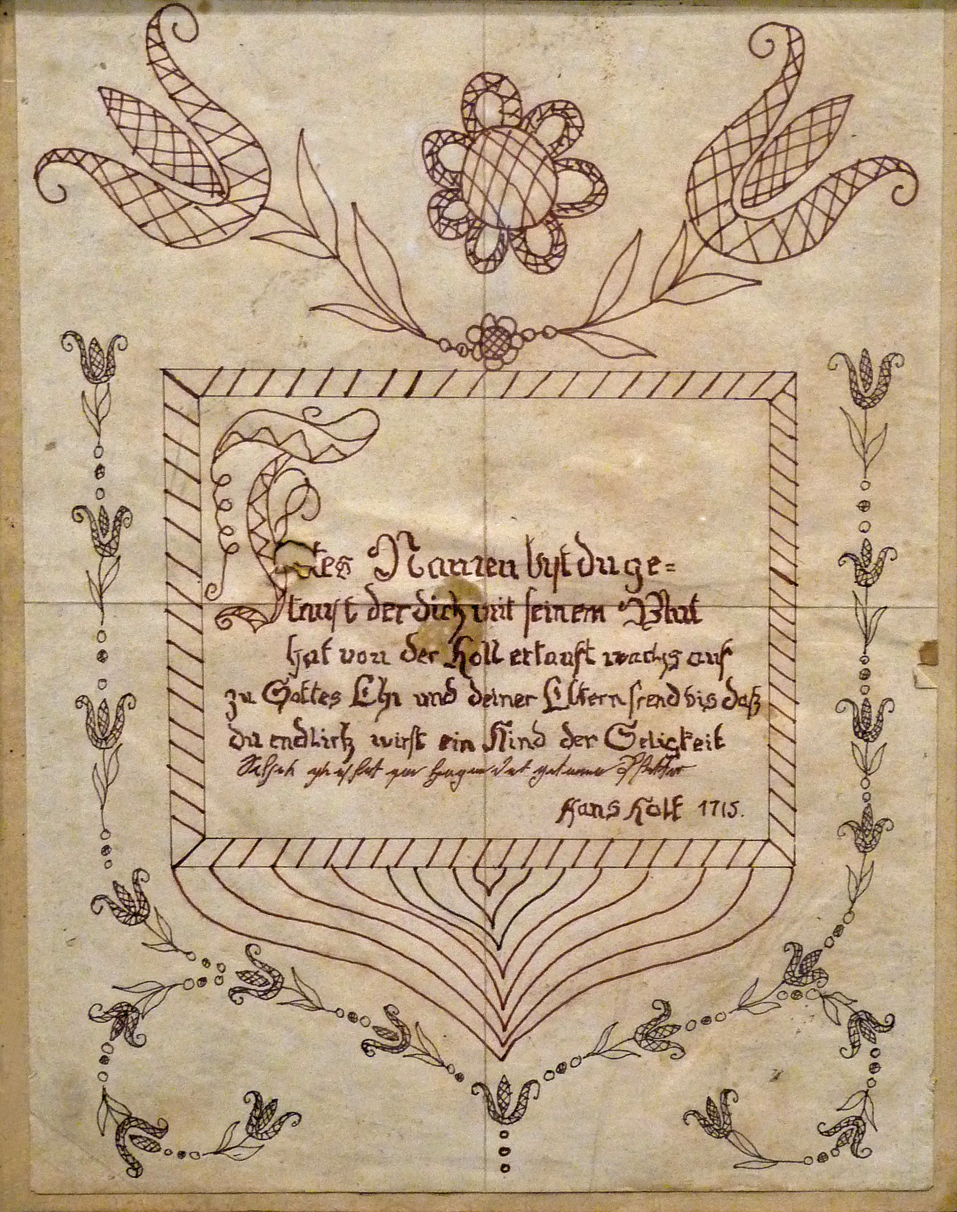 Gaetelbrief, ou souhaits de baptême alsaciens. Entre 1715 et début 1900. Musée du pain d'épices et de l'art populaire alsacien, Gertwiller